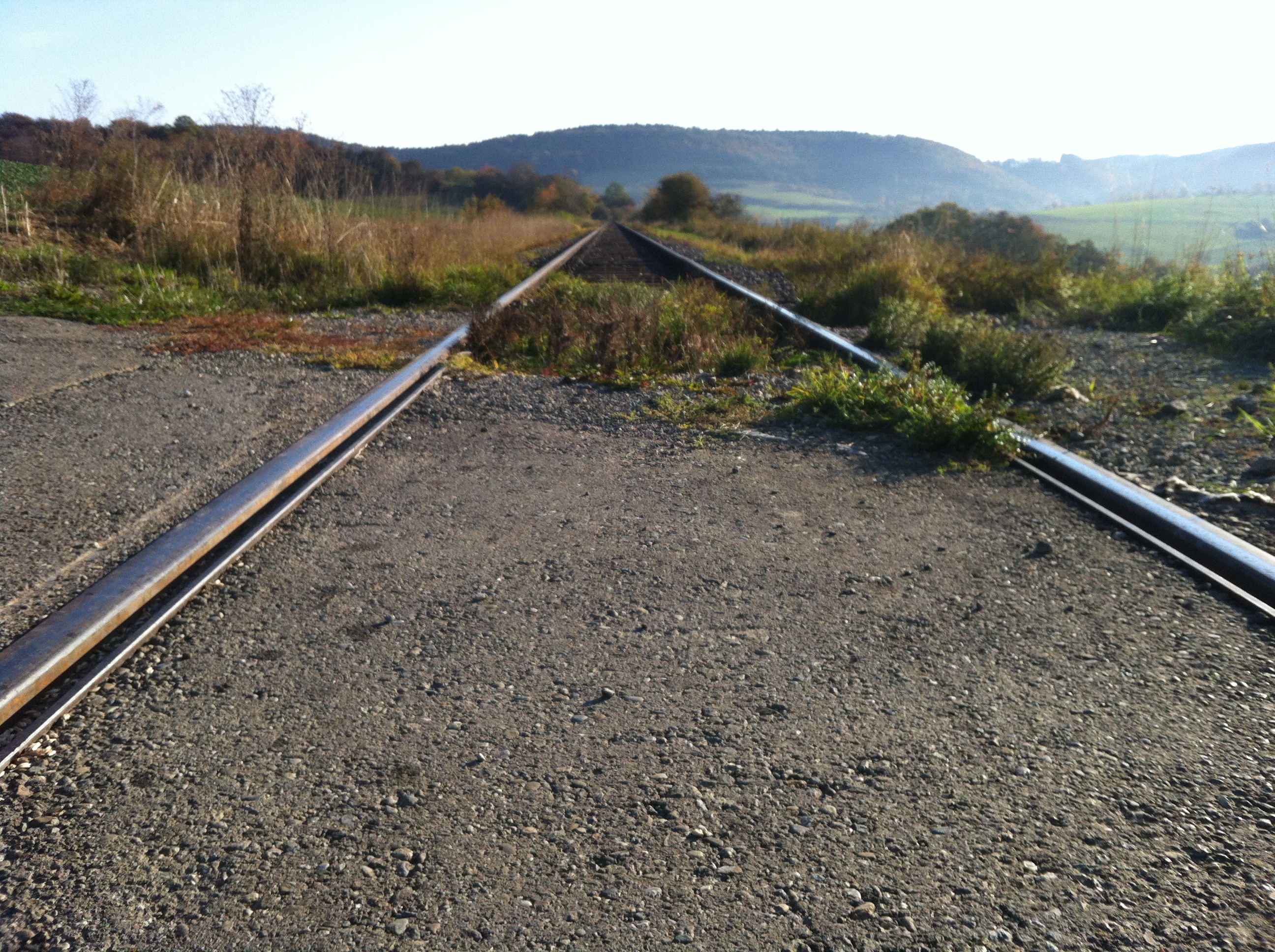 Wutachtalbahn — ehemalige Strategische Umgehungsbahn (Schweiz) in Baden-Württemberg, erbaut 1887—1890. Übergang bei Fützen in Richtung Blumberg (Buchberg).